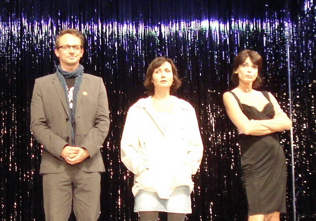 Tobias Schulze spielt am Theater am Kurfürstendamm in Berlin